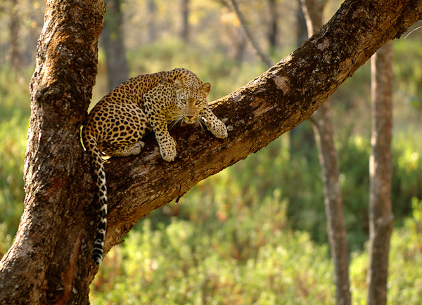 Leopard from BR hills, Karnataka.